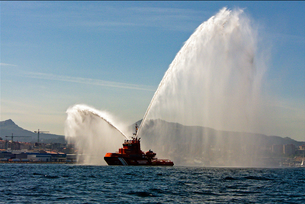 Remolcador